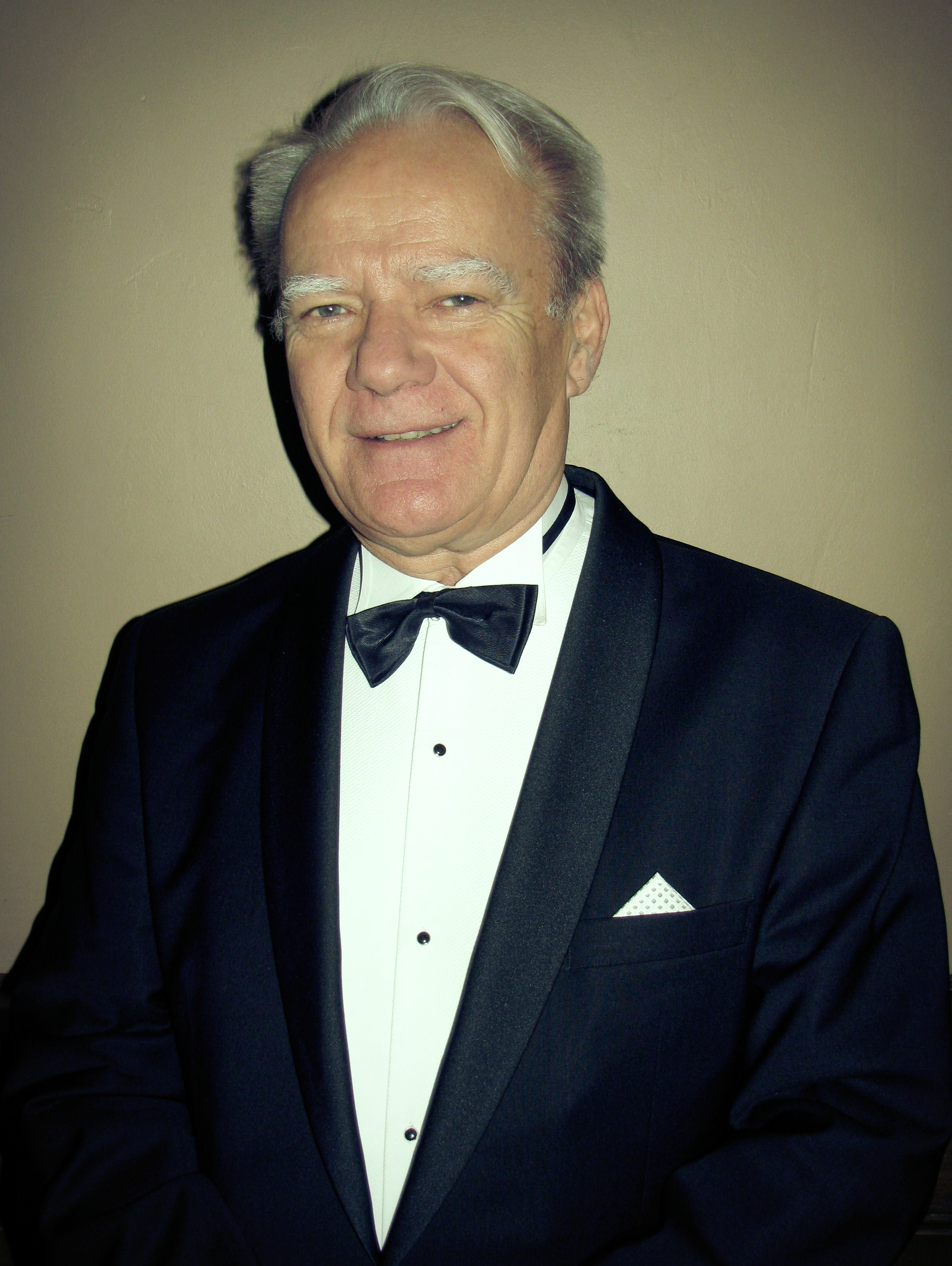 Prof. Wojciech Rajski, dyrygent i pedagog.